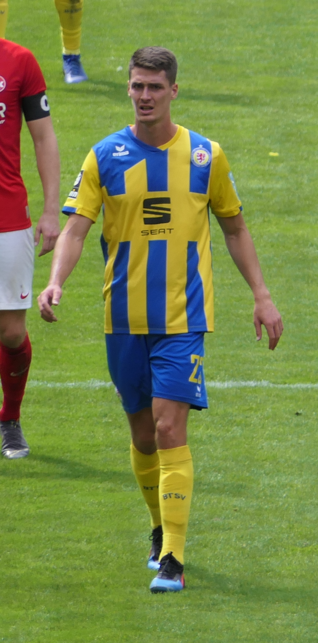 Der Fussballprofi Danilo Wiebe im Trikot von Eintracht Braunschweig beim Auswärtsspiel gegen den 1.FC Kaiserslautern am 18.08.2019.